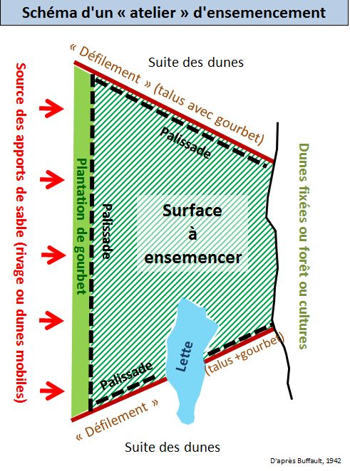 Schéma d'après Histoire des dunes maritimes de la Gascogne, Bordeaux, Editions Delmas, 1942 de Pierre Buffault fig. n°24 p. 289